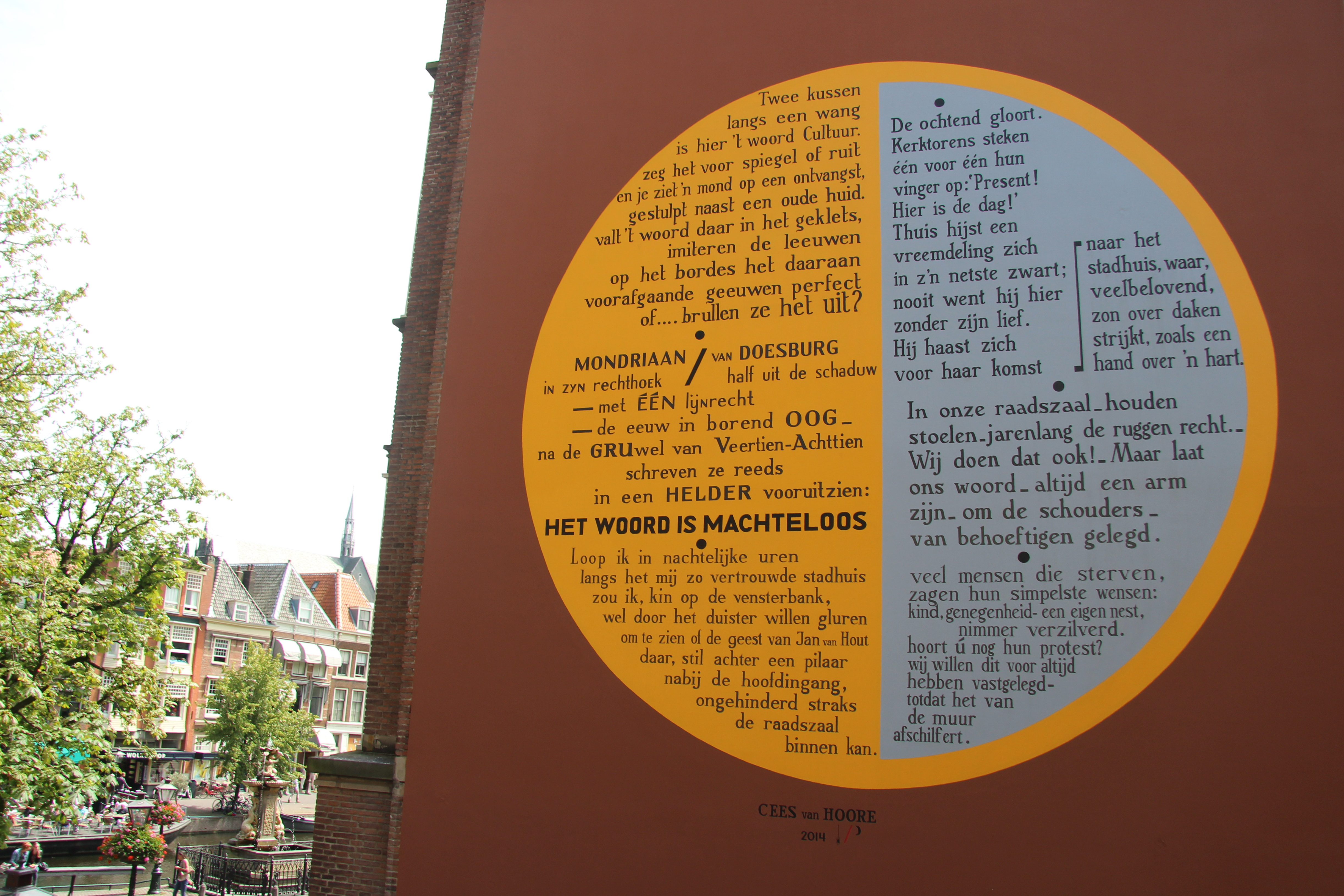 Cees van Hoore schreef op verzoek van de gemeente Leiden de tekst voor het 108e muurgedicht dat in opdracht van de gemeente is aangebracht op een zijmuur van het stadhuis door de stichting Tegen-Beeld. Het werd op 24 juni 2014 onthuld door burgemeester Henri Lenferink.